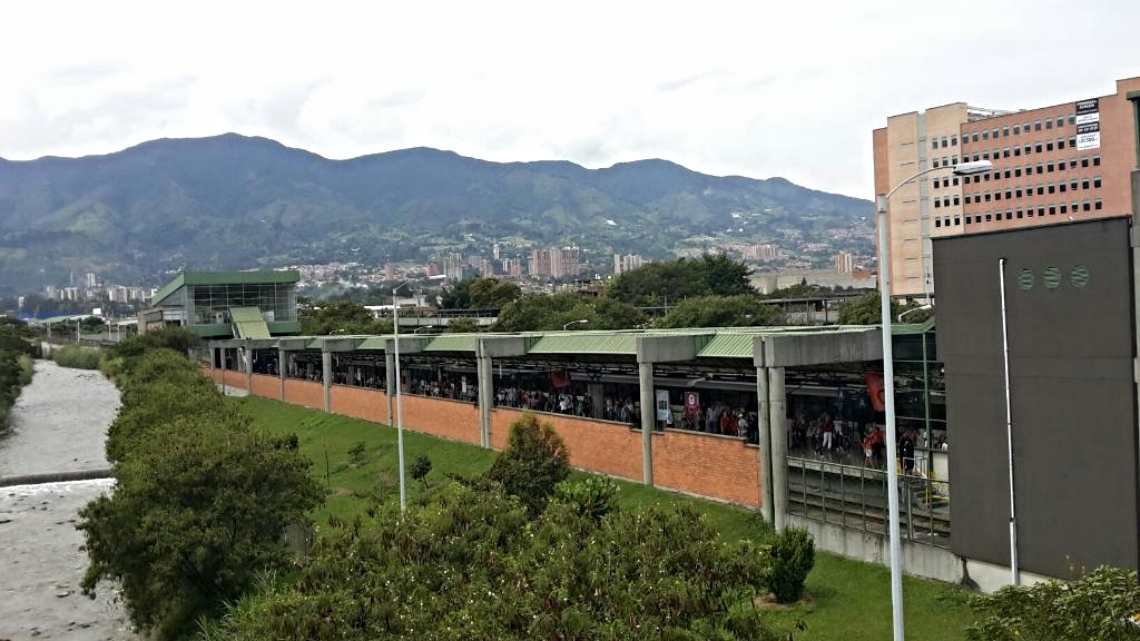 Estación Itagüí (Metro de Medellín) 2